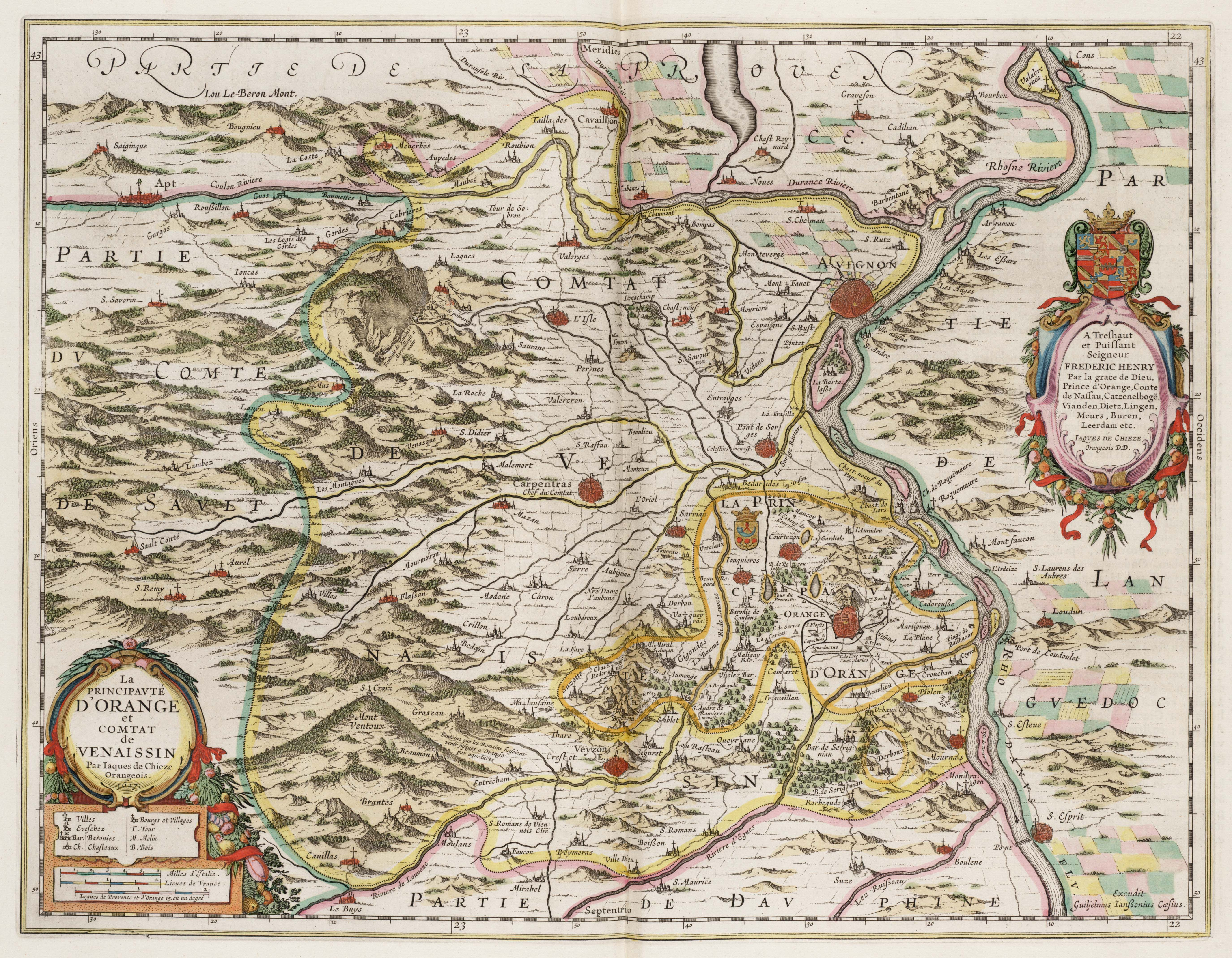 Kaart van het prinsdom "Orange"